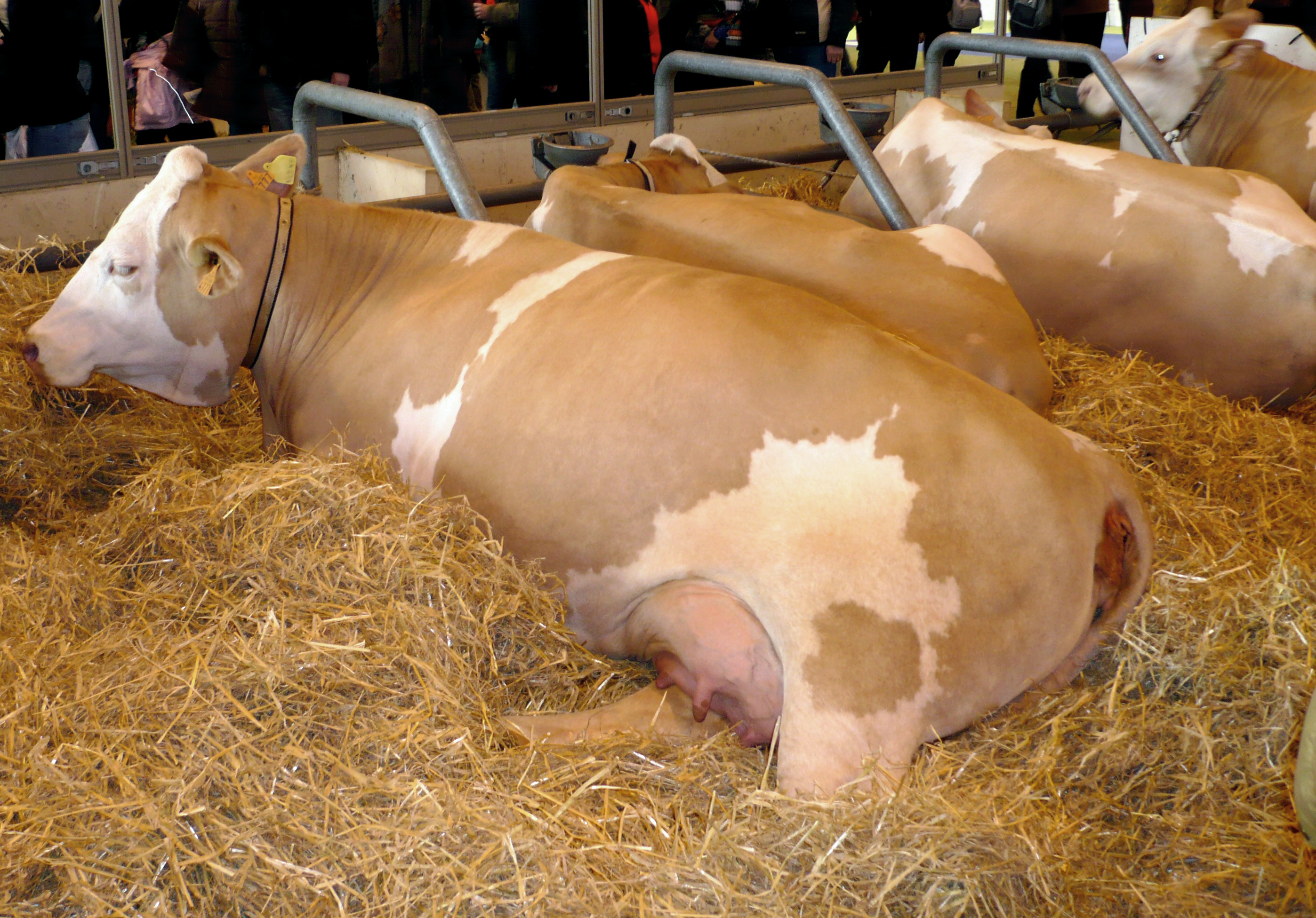 Photos prises lors du Salon international de l'Agriculture 2008 vache simmental / cow (simmental race)